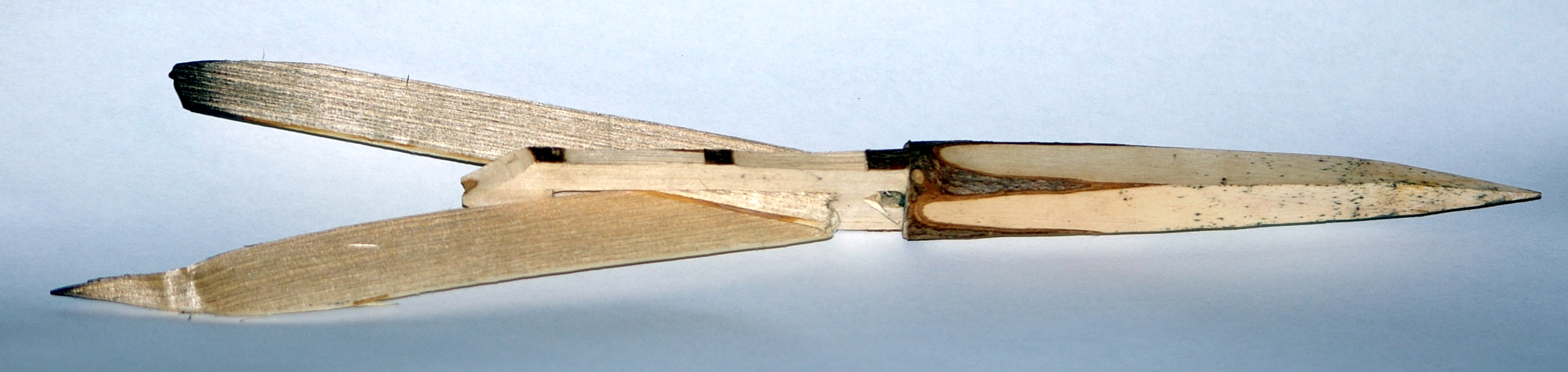 дървена обредна стрела